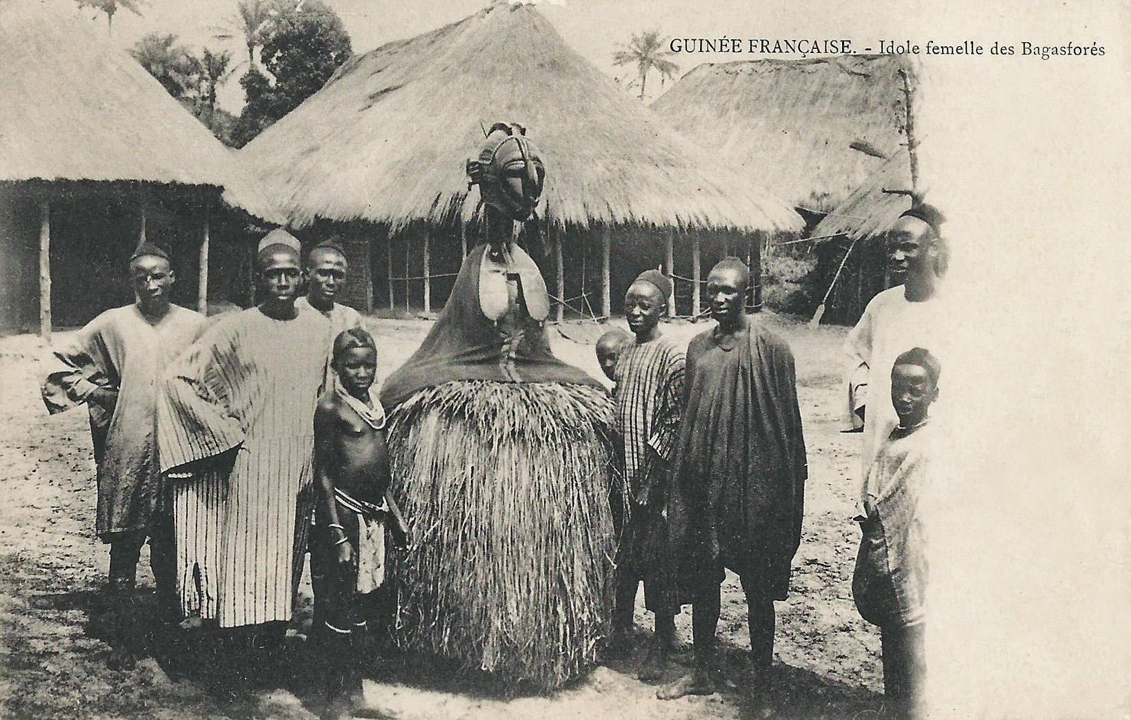 Idole femelle des Bagasforés. sans mention d'auteur, d'éditeur ou de date, cité et décrit par Ross Archive of African Images [1] Guinée française